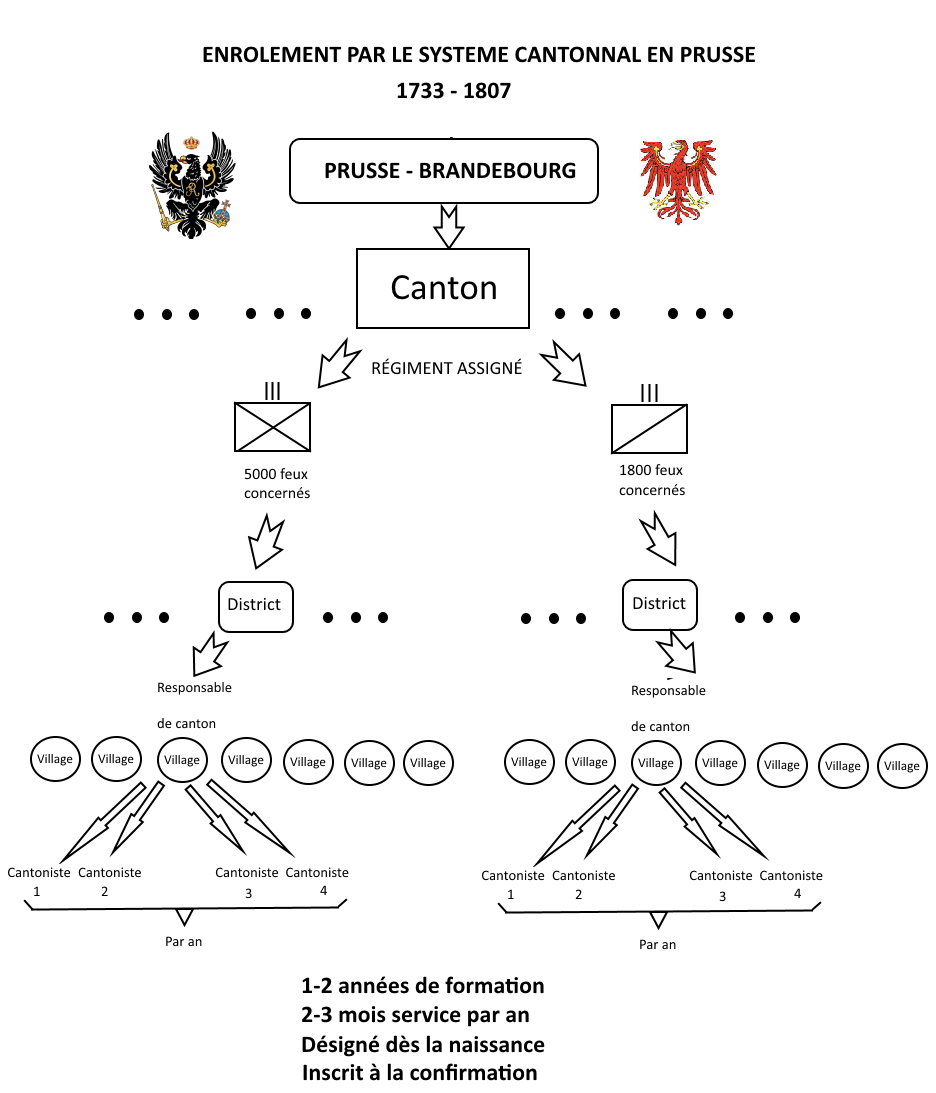 Croquis du principe du système cantonal en Prusse pour la circonscription militaire